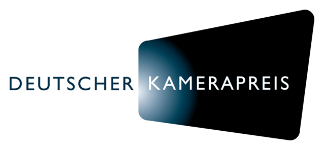 Offizielles Logo Deutscher Kamerapreis